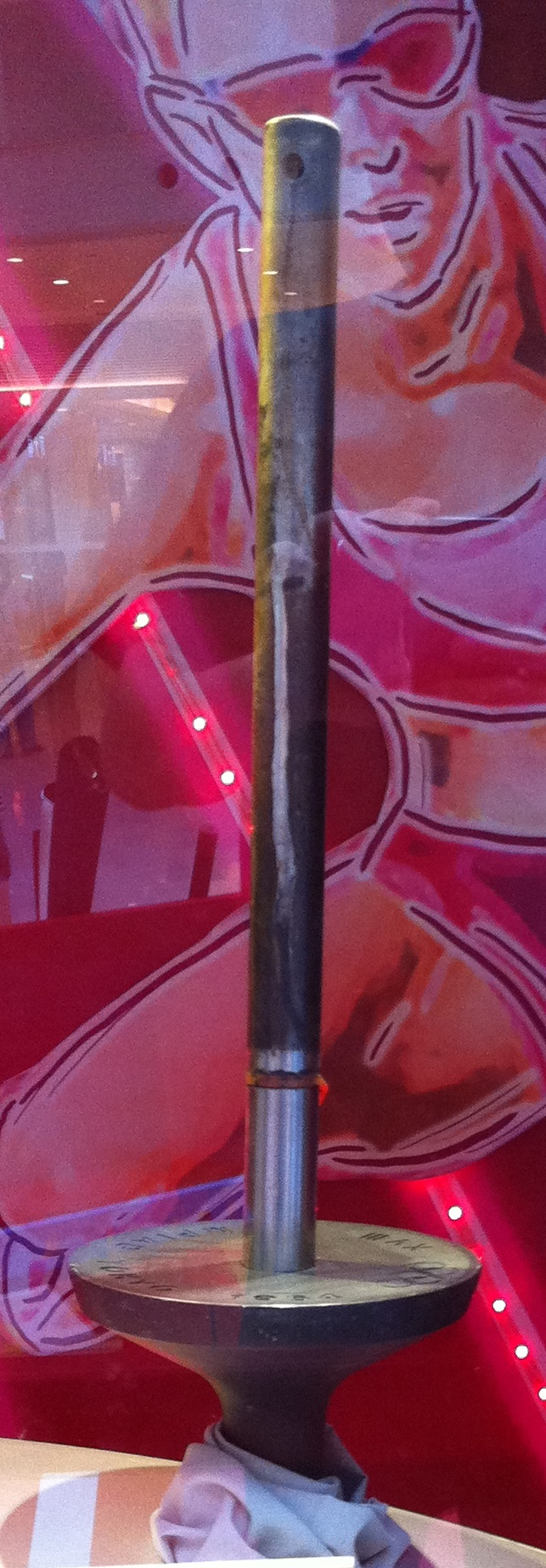 1964年夏季奧運火炬